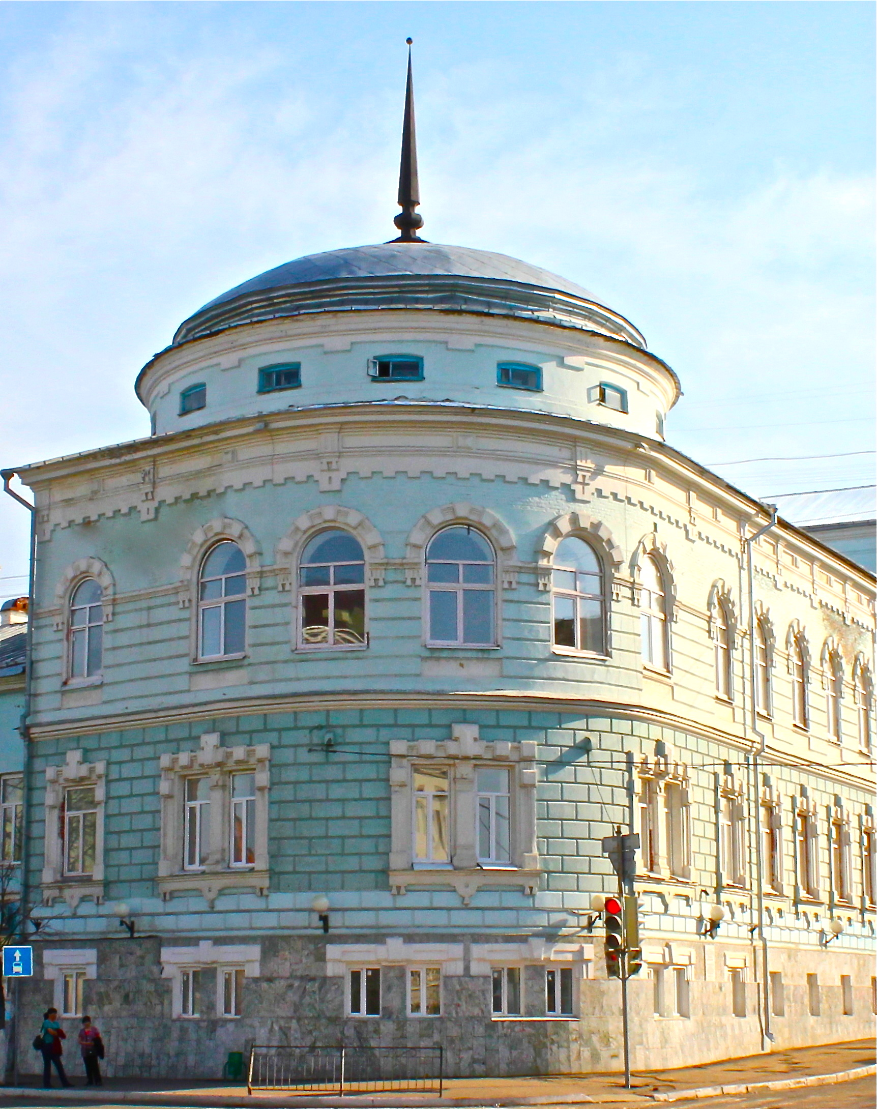 Старинное здание Казани - главный корпус Казанского государственного педагогического института (ныне - один из корпусов Казанского федерального университета